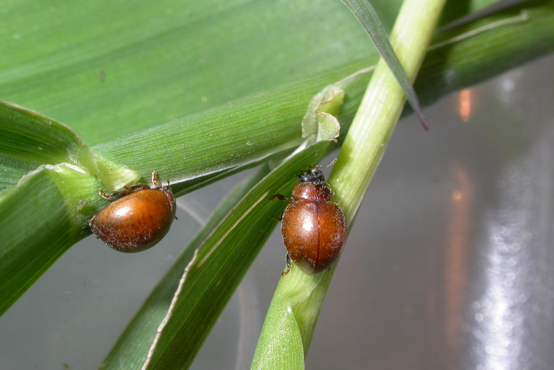 Cynegetis impunctata